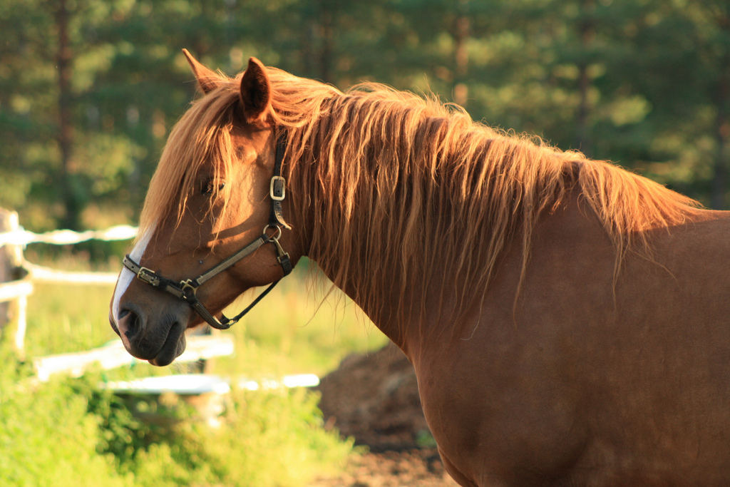 Suomenhevonen - Finnhorse.